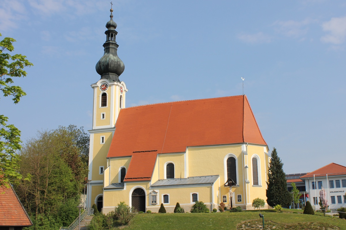 Kath. Pfarrkirche hl. Vitus